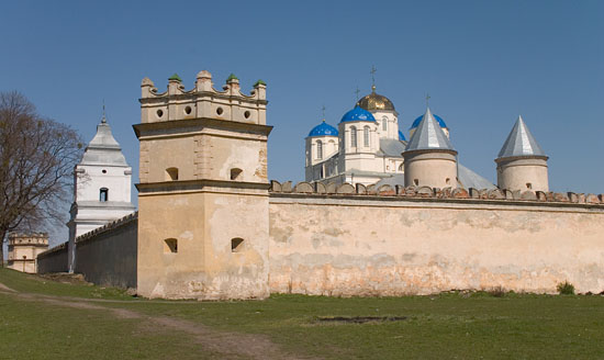 Межиріч, Острозький район, Рівненська область